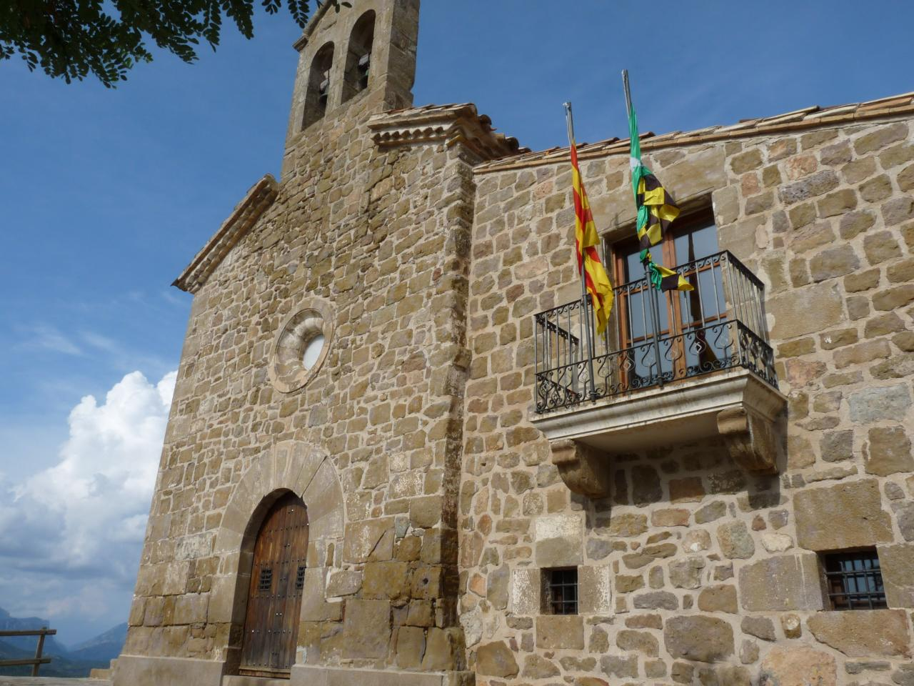 El dia 8 de setembre, Nativitat de la Mare de Déu, es pujava altre cop a l'ermita de Solers, per donar gràcies per la collita